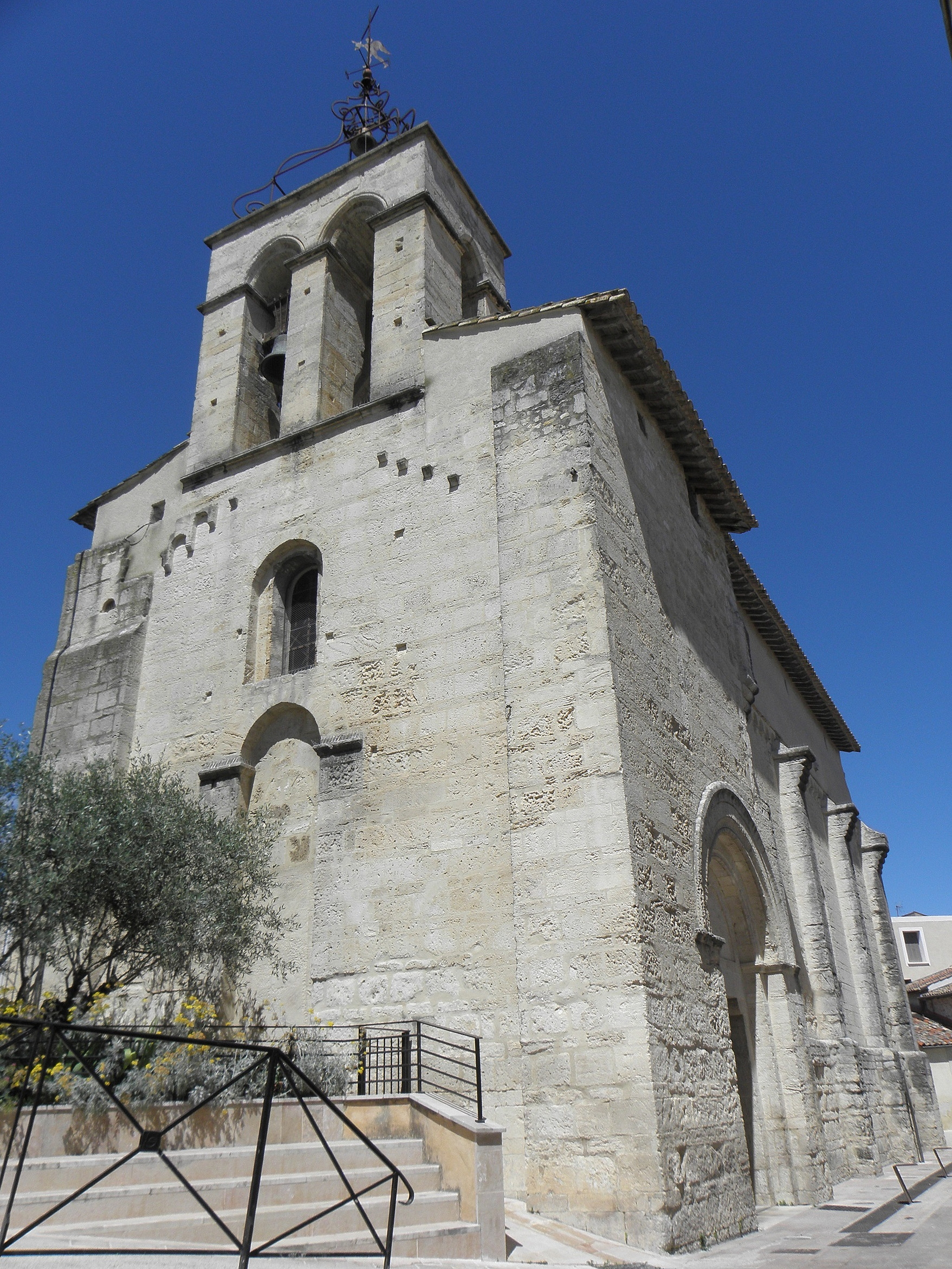 Église Saint-Jean-Baptiste de Castelnau-le-Lez (34). Façade occidentale.